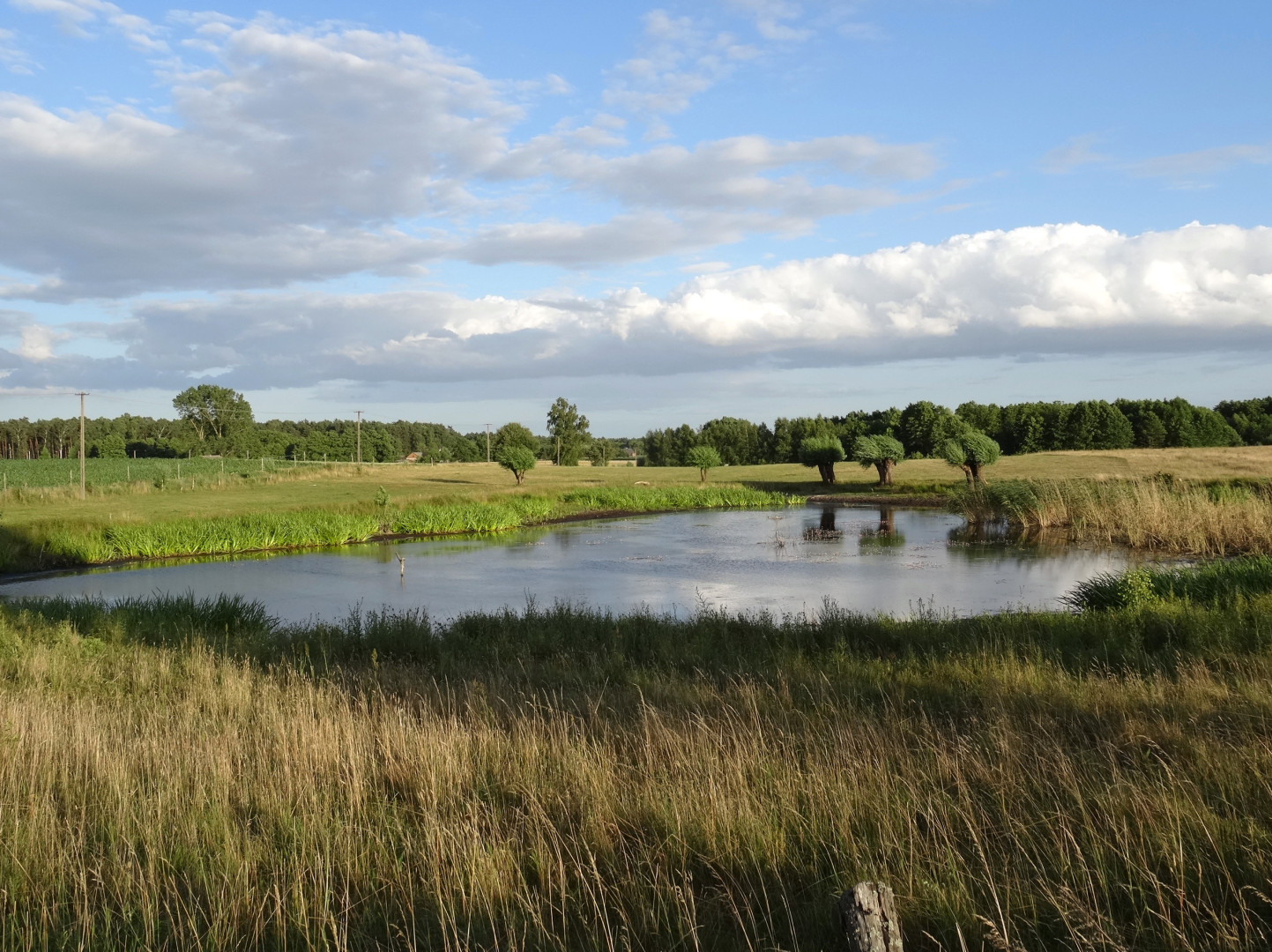 Położona w Puszczy Bydgoskiej wieś Leszyce, gmina Nowa Wieś Wielka, powiat bydgoski